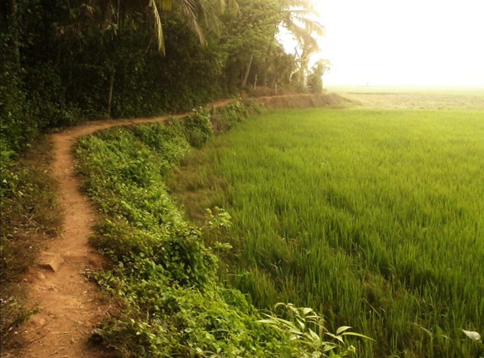 തോട്ടുവരമ്പ്